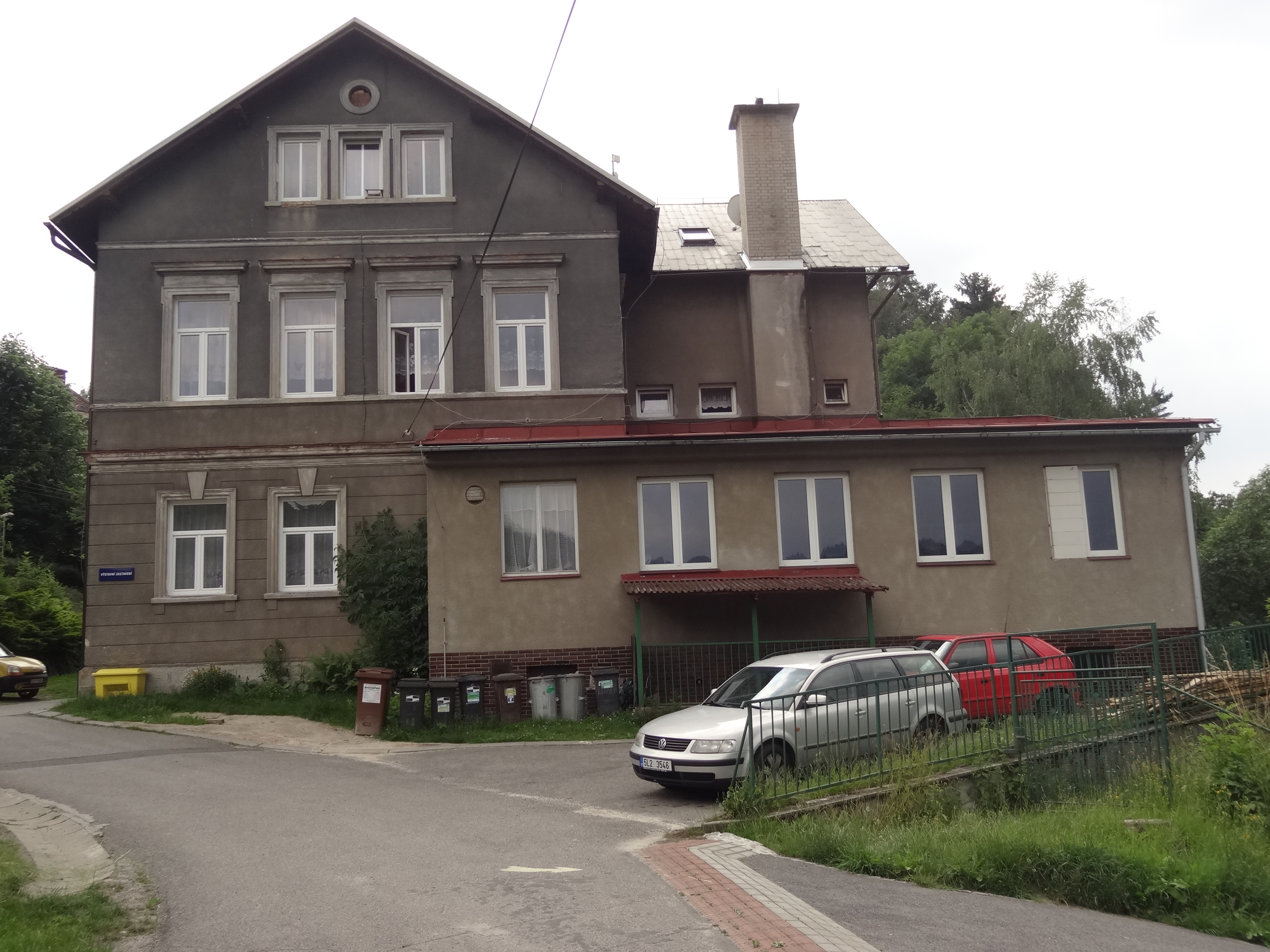 Líšný 2.díl - obecní úřad a knihovna čp. 60